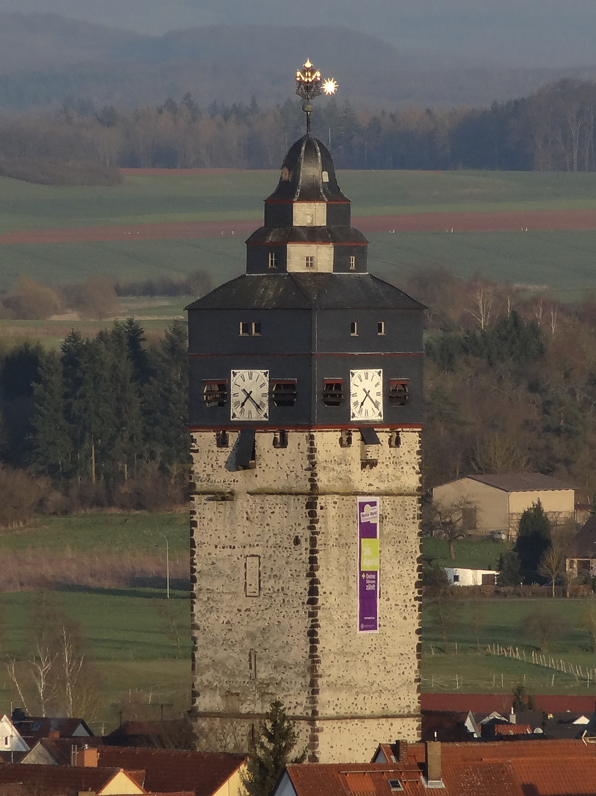 Stadtturm_Lich